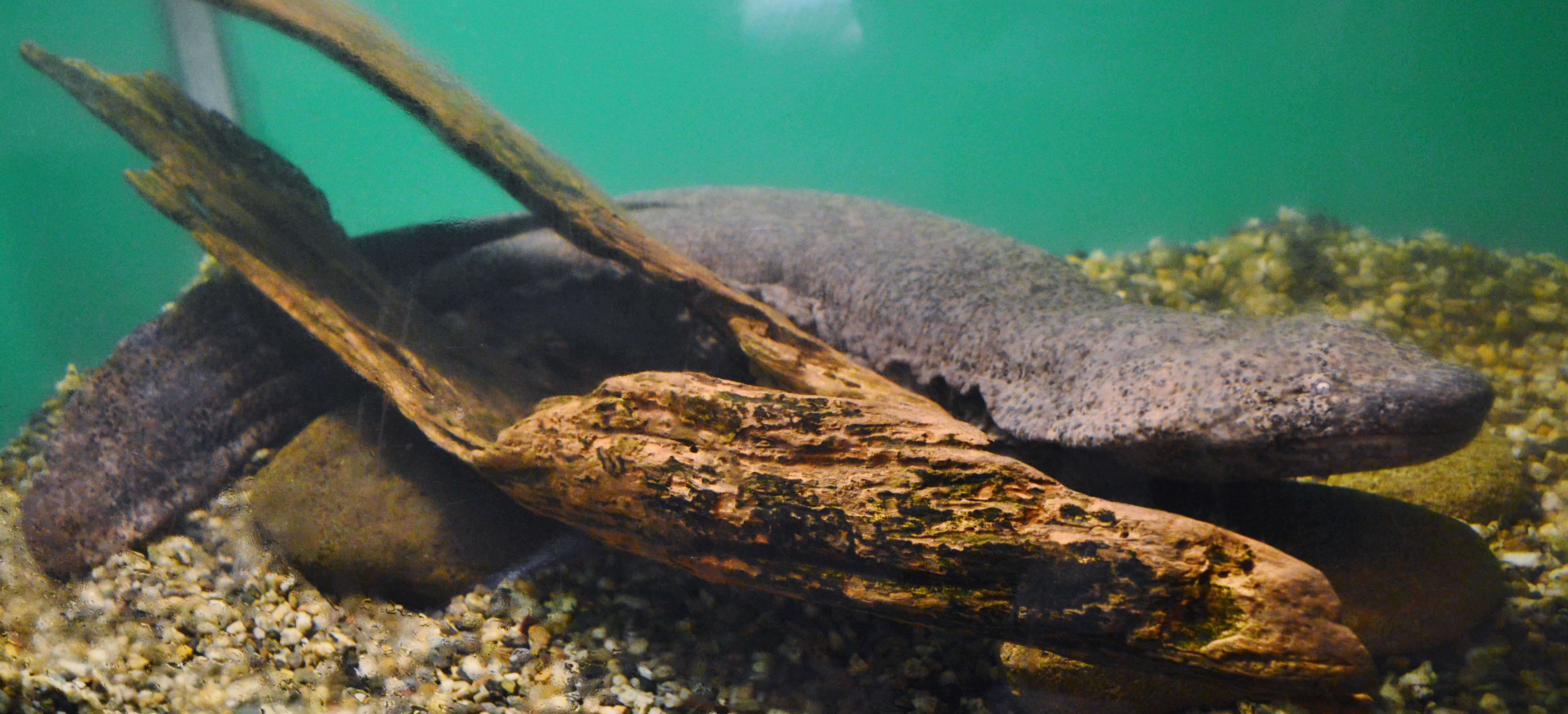 オオサンショウウオ (交雑種) (日本サンショウウオセンターにて) Nikon D3200